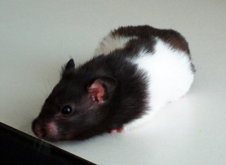 Goldhamster - Mesocricetus auratus